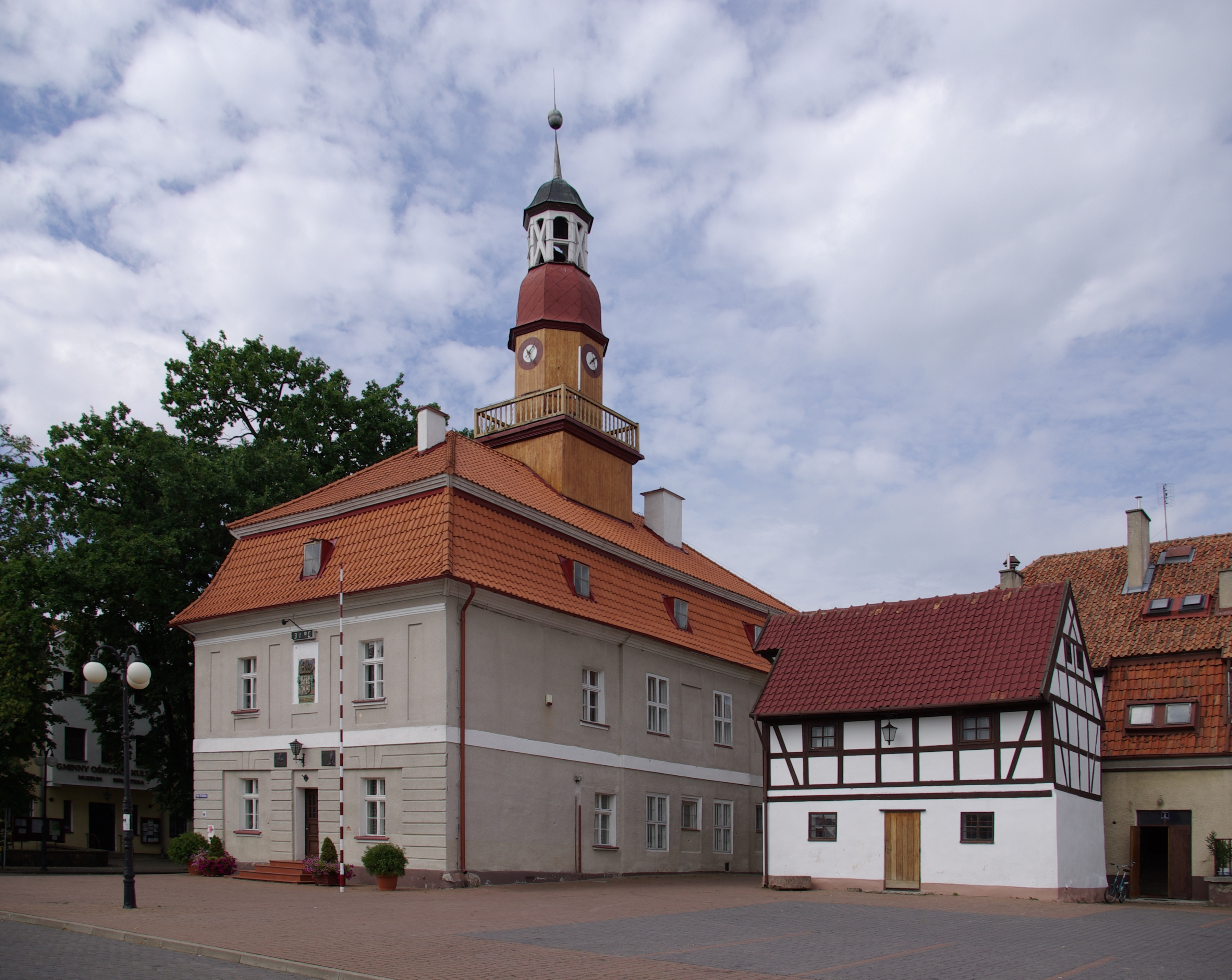 Srokowo